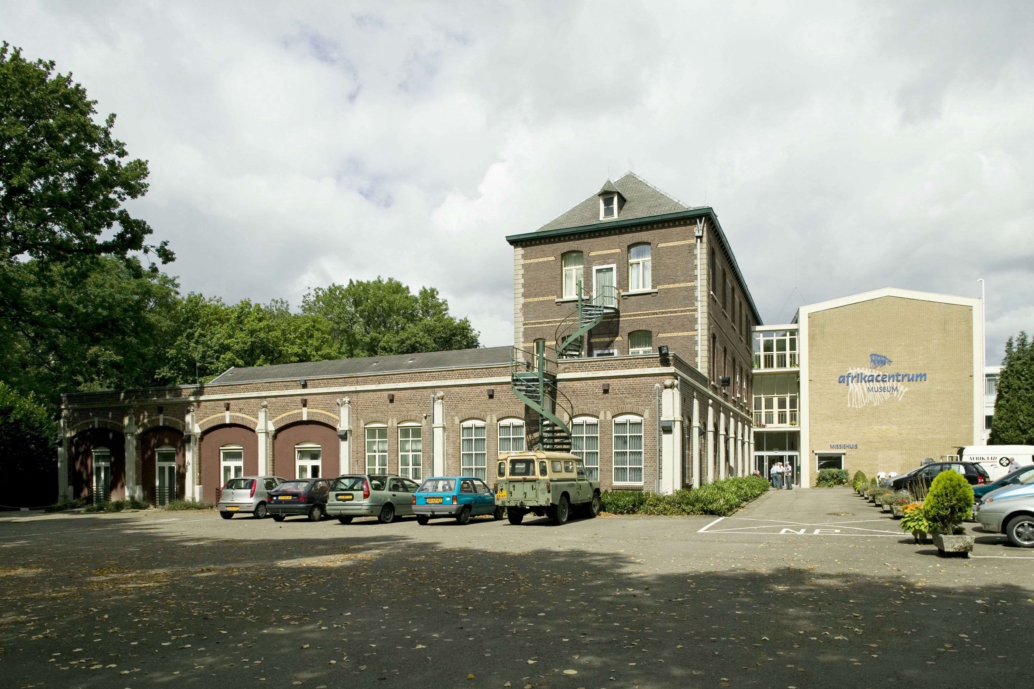 Missiehuis Societeit Voor Afrikaanse Missien: Overzicht van het missiehuis (opmerking: Gefotografeerd voor Monumenten van Herrezen Nederland)